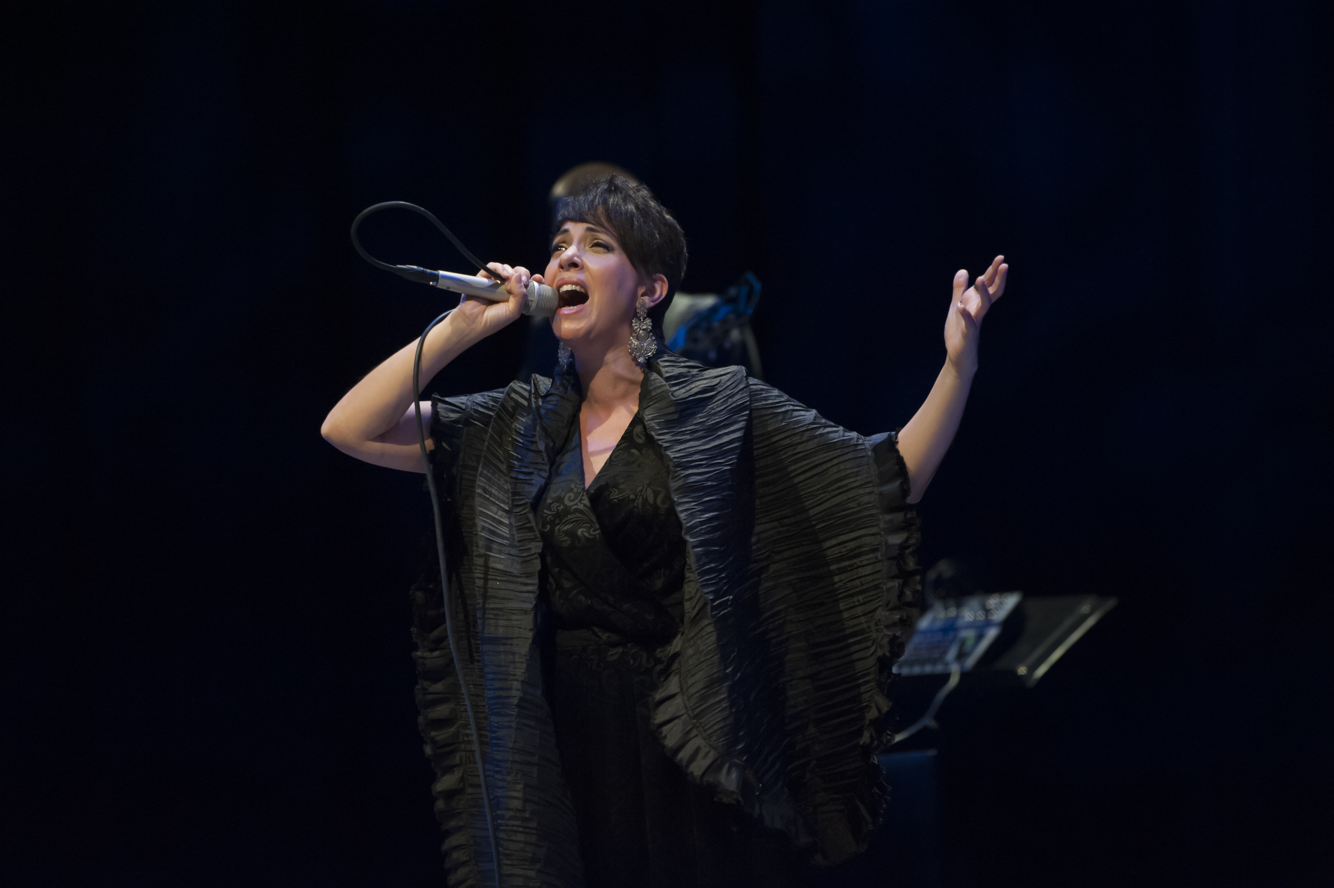 Teresa Salgueiro Concerto